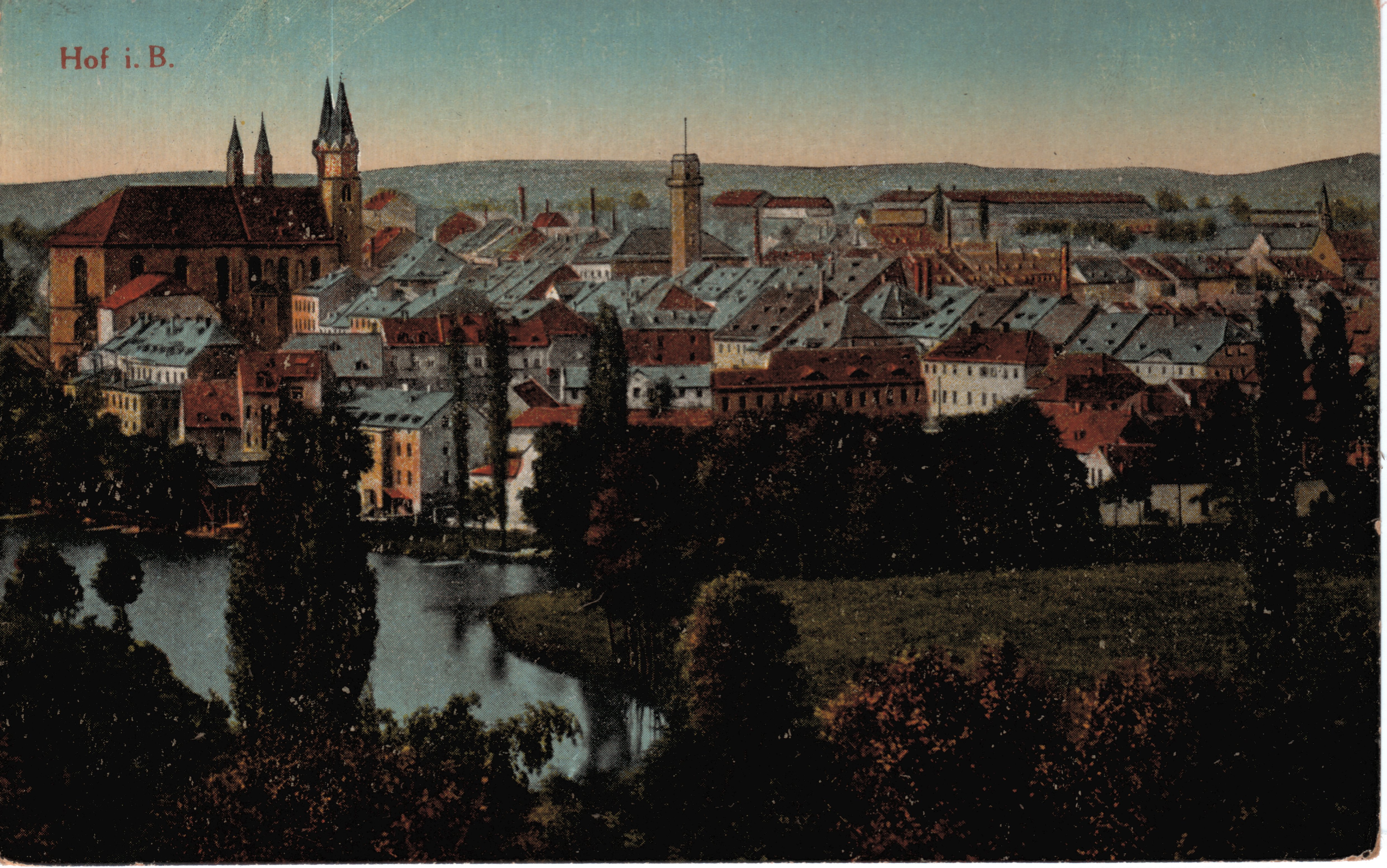 Képeslap ( ca.1914 ).